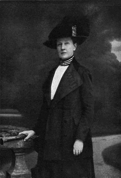 Cecylia Plater-Zyberk